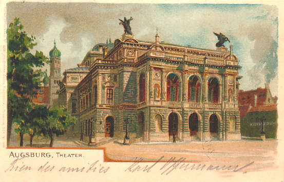 Fronttext: "Augsburg, Theater", "Künstlerpostkarte No. 1086 von Ottmar Zieher Kunstanstalt München Dep. No. 1028", gesendet: aus Augsburg nach Günzburg